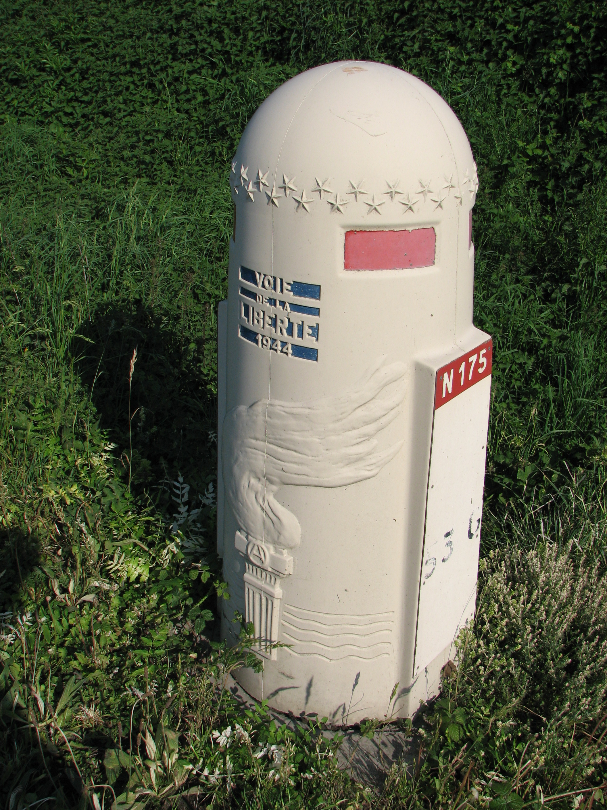 Borne de la voie de la Liberté sur la N175 entre Avranches et Dol de Bretagne (nouvelle en matière synthétique pour limiter les dégats en cas d'accident routier)Liberty Road stone on the road N175 between Avranches and Dol de Bretagne (new plastic one to prevent injury in case of road accident)